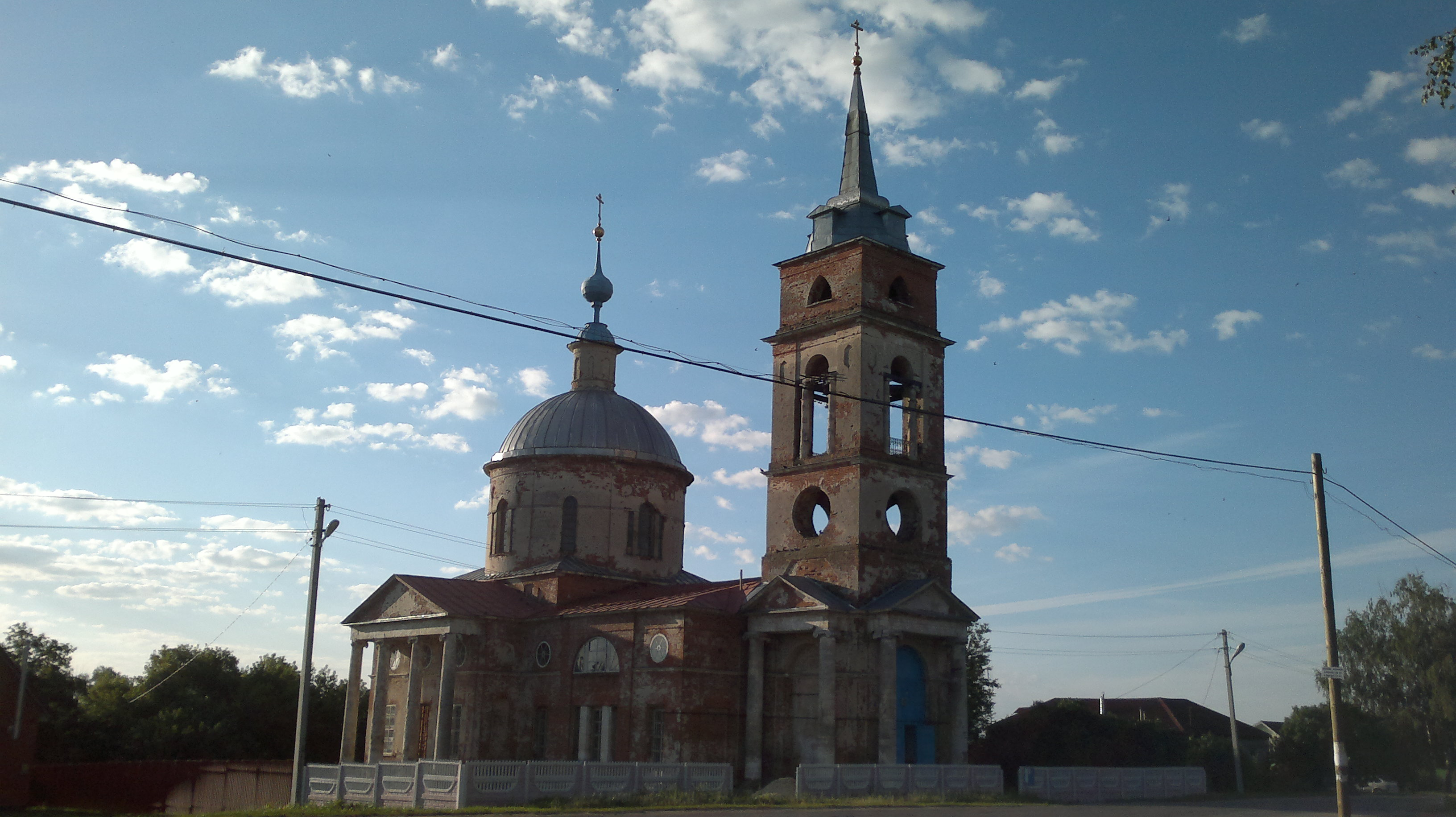 Церковь Рождества Христова: Желудево, Шиловский район, Рязанская область